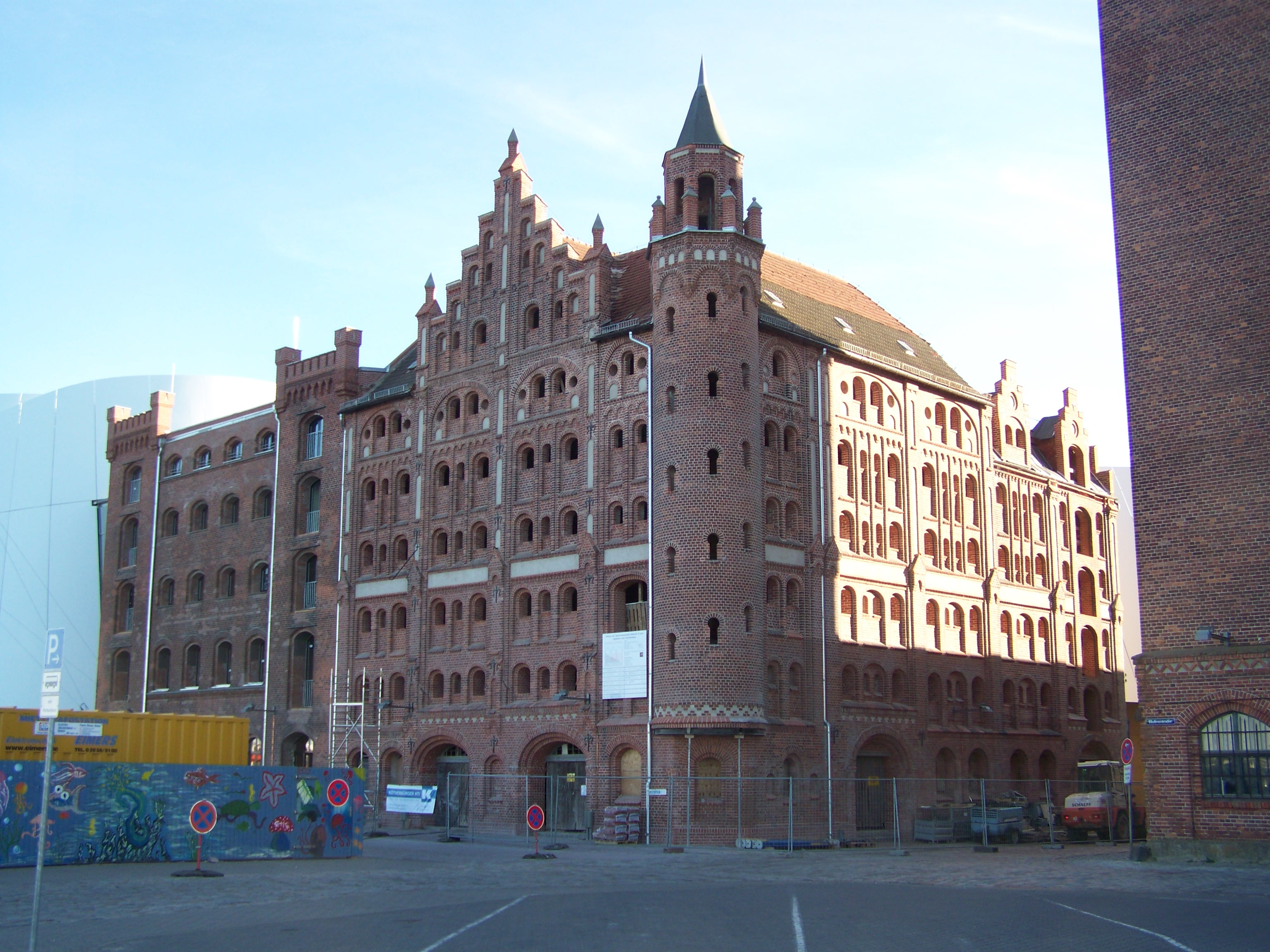 Stralsund, Hafen. Das Gebäude Hafenstraße 8, genannt Türmchenspeicher, neben dem Ozeaneum Stralsund.